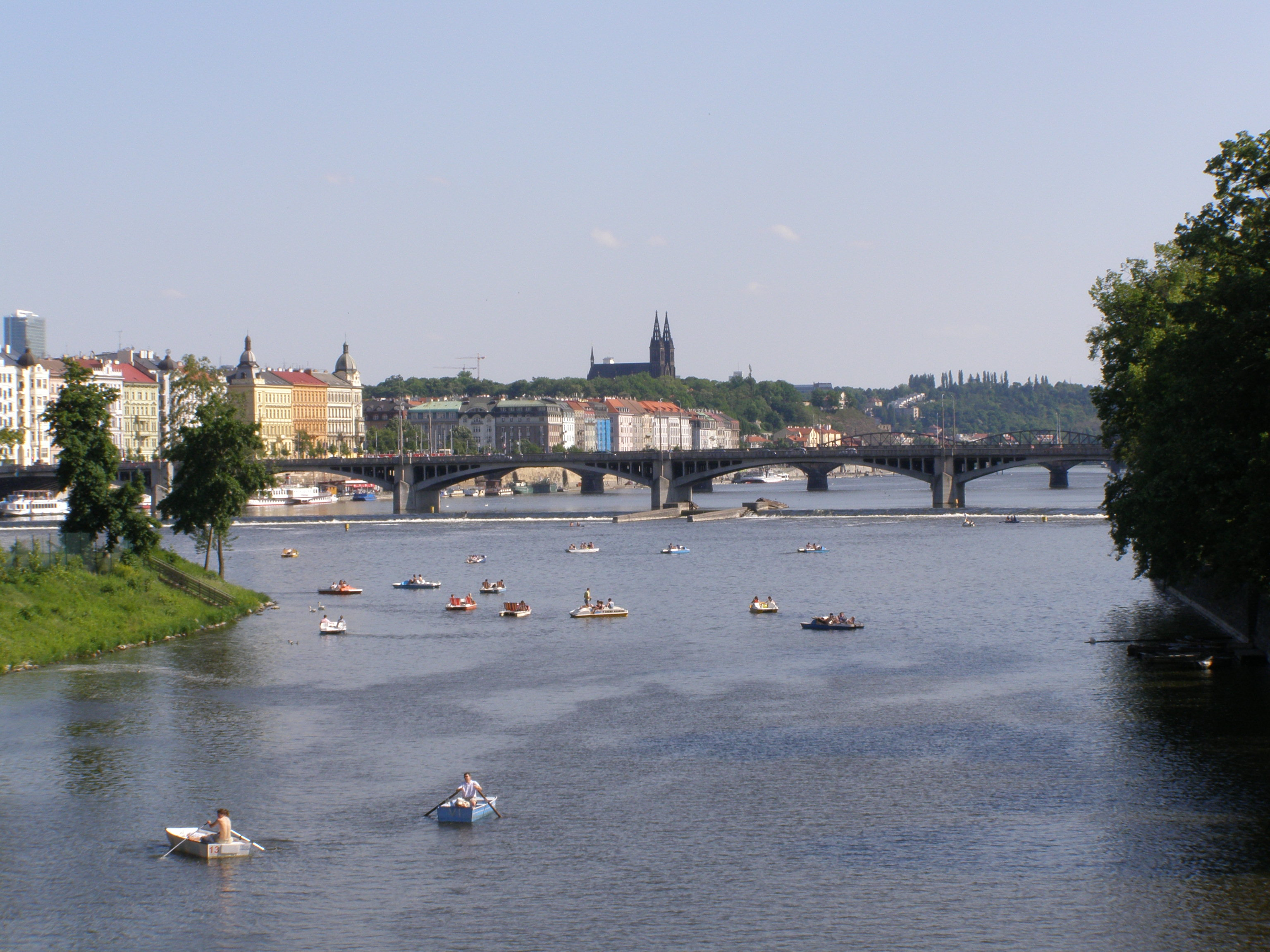 Praha, Jiráskův most, pohled z Mostu legií